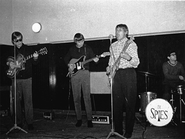 The Spies na zkoušce v Domě pionýrů a mládeže